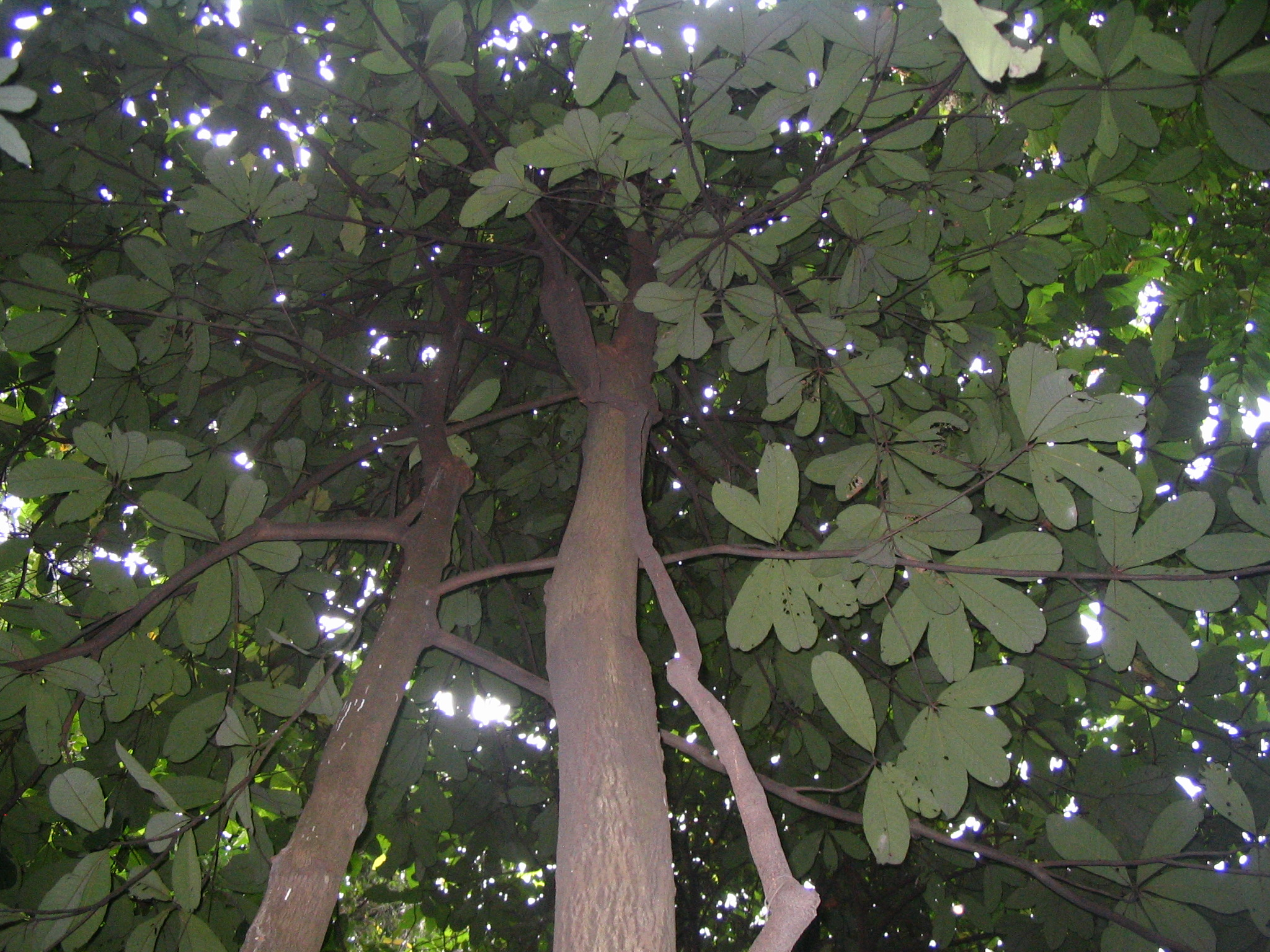 Palaquium maingayi - Bukit Nanas forest reserve - Kuala Lumpur